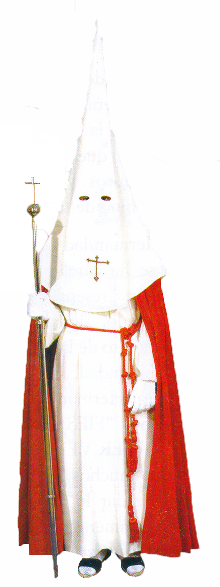 Hábito de la Hermandad de la Santa Cruz y Santa Reina Elena de Ocaña (Toledo)